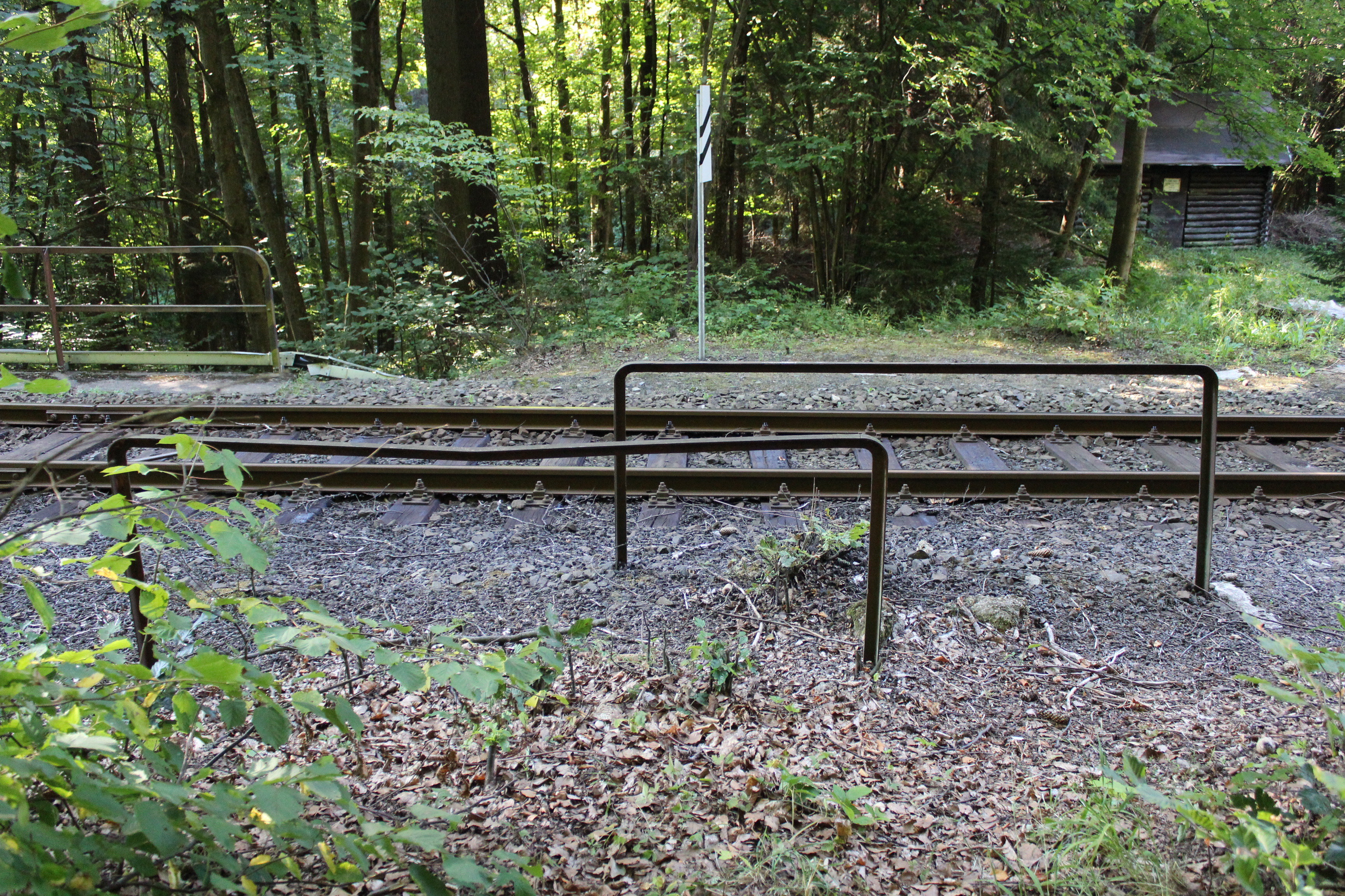 Bývalá železniční zastávka Držkov - bezpečnostní zábradlí